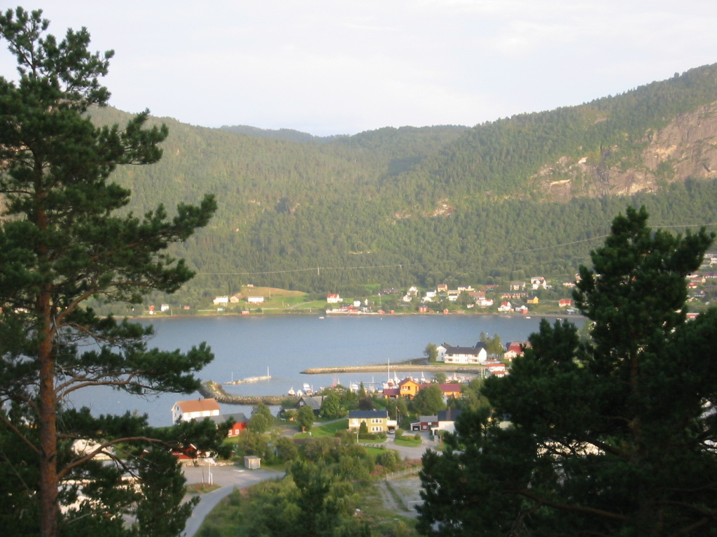 Kyrksæterøra sentrum.